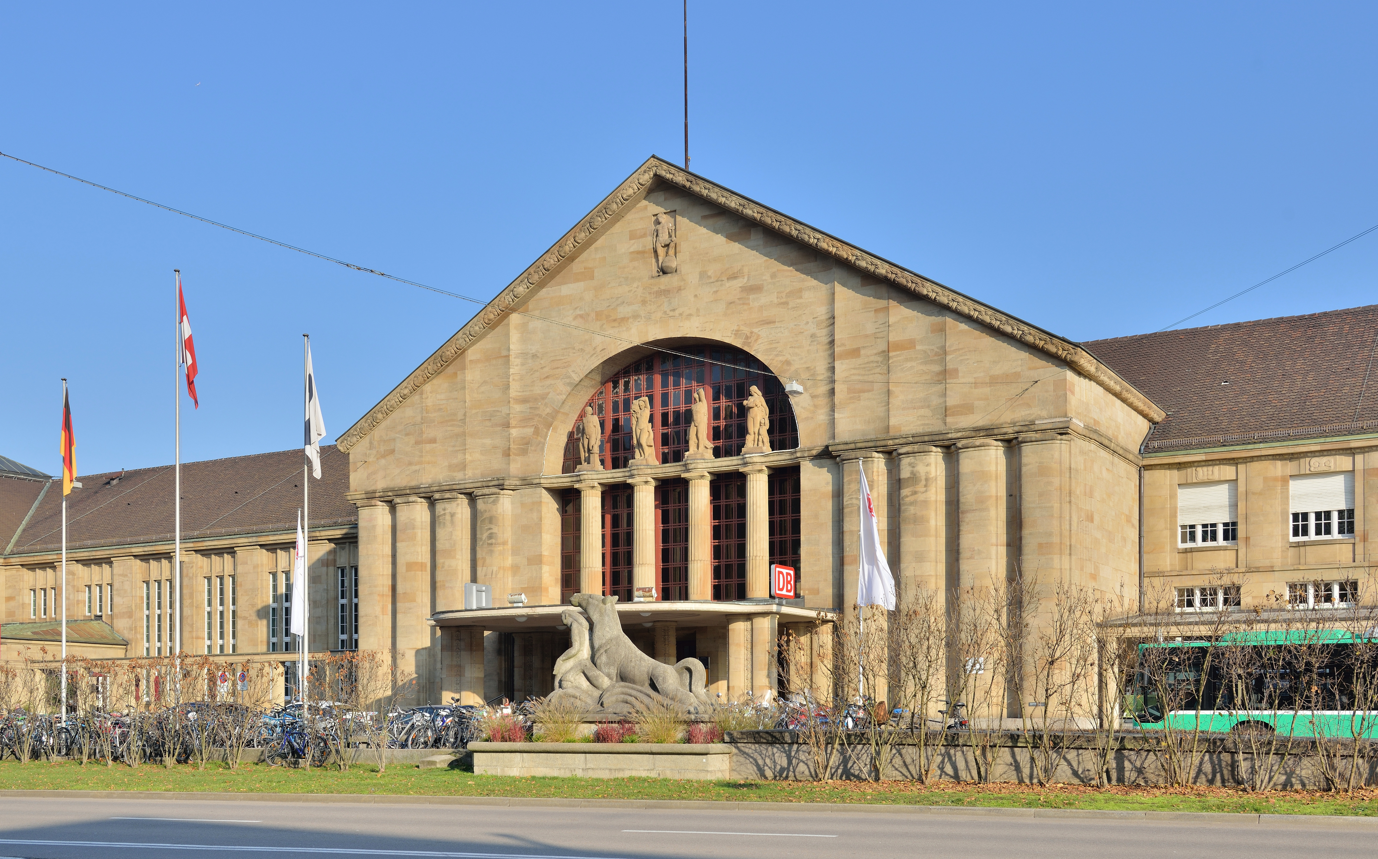 Basel: Badischer Bahnhof